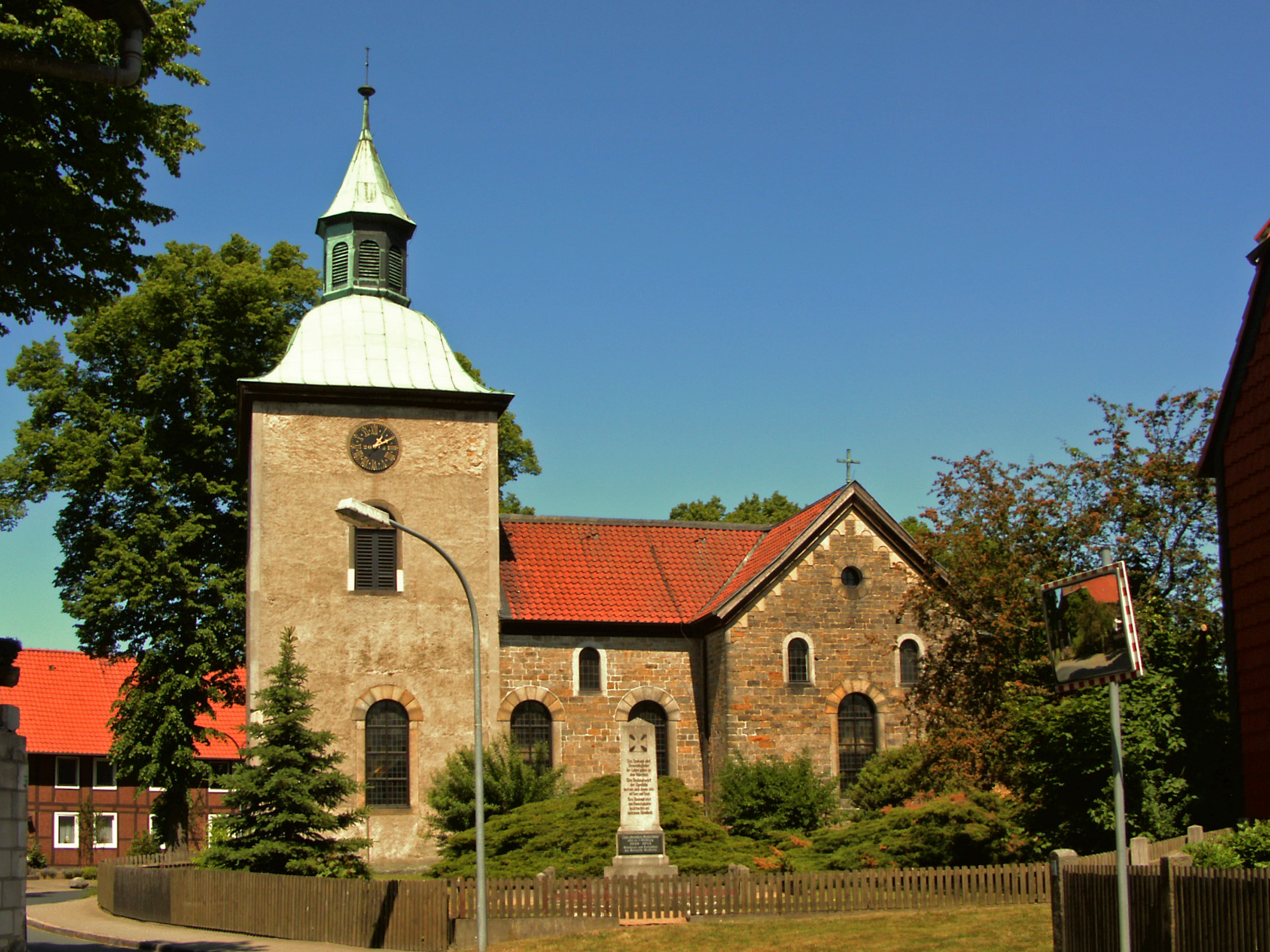 Evangelische Kirche in Grafhorst, Landkreis Helmstedt.